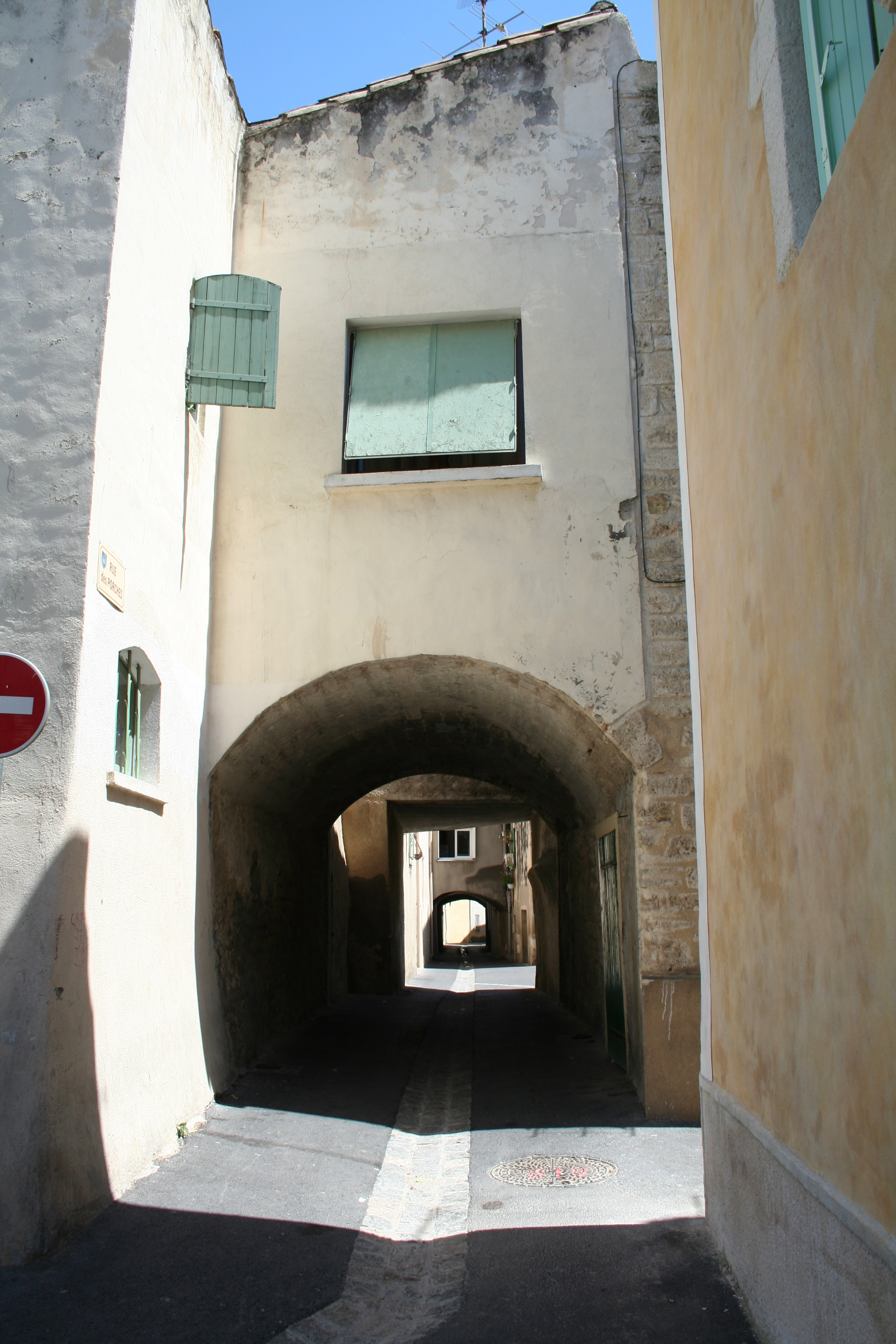 Pignan (Hérault) - rue des porches.